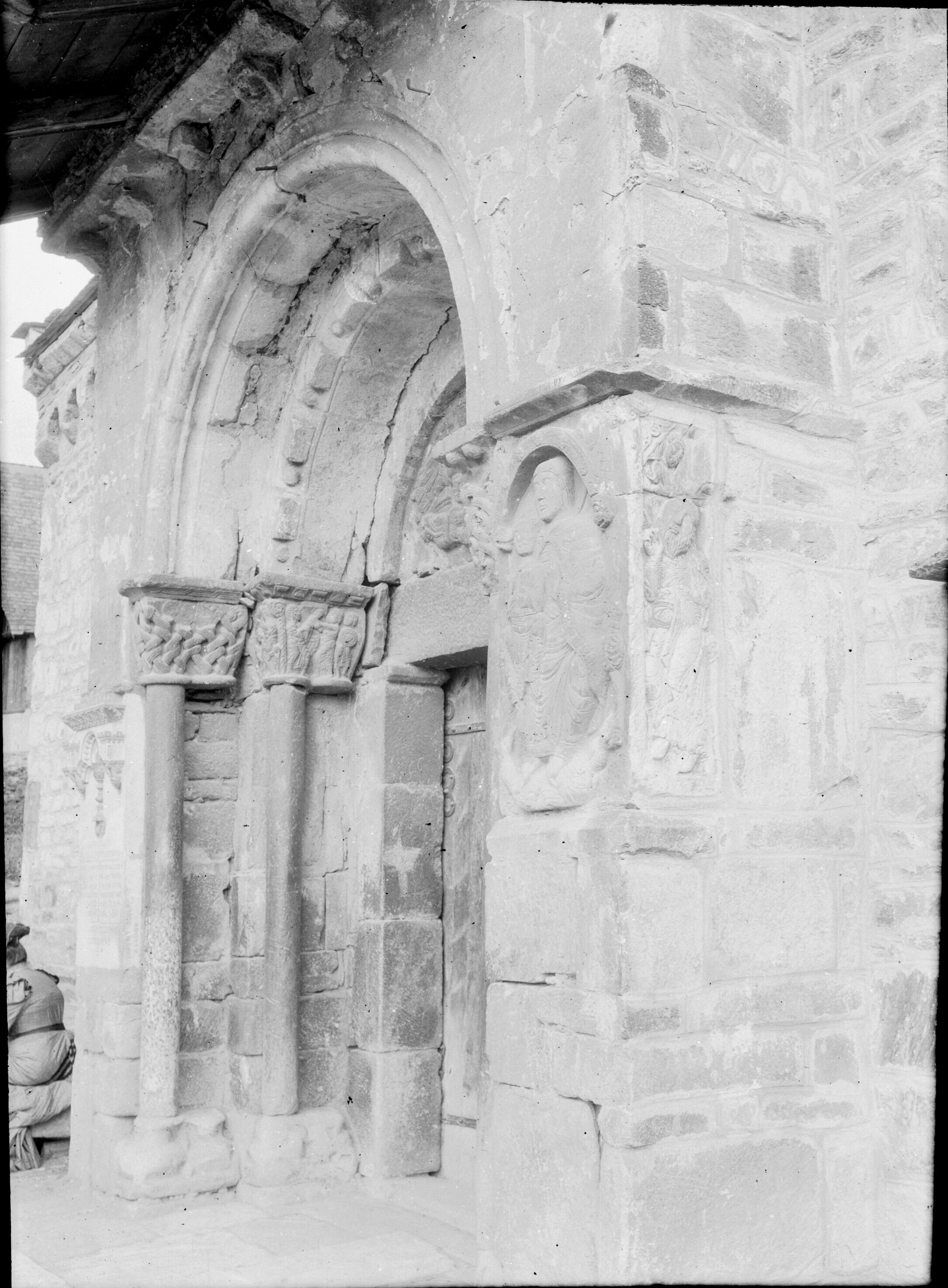 Fonds Trutat - Photographie ancienne Cote : TRU C 303 Localisation : Fonds ancien Original non communicable Titre : Portail roman, Luchon (portail de l'église de Saint-Aventin, en vallée de Larboust) Auteur : Trutat, Eugène Rôle de l’auteur : Photographe Lieu de création : Bagnères-de-Luchon (Haute-Garonne) Date de création : : 1859-1910 [entre] Mesures : 11 x 9 cm Mot(s)-clé(s) : -- Portail -- Sculpture -- Décor d'architecture -- Colonne -- Chapiteau -- Voûte -- Pierre -- Bas-relief -- Entrée -- Porte -- Bagnères-de-Luchon (Haute-Garonne) -- Bagnères-de-Luchon (Haute-Garonne ; canton) -- Midi-Pyrénées (France) -- 19e siècle, 2e moitié -- 20e siècle, 1e quart Médium : Photographies -- Négatifs souples -- Noir et blanc -- Vues d'architecture Bibliographie : Frappé (Jean-Bernard). - Autrefois Bagnères de Luchon. Tome I. - Anglet : Atlantica, 2001. - 345 p. ; 15 x 22 cm. - (Autrefois) cf. p. 140-141. Bibliothèque de Toulouse. Domaine public